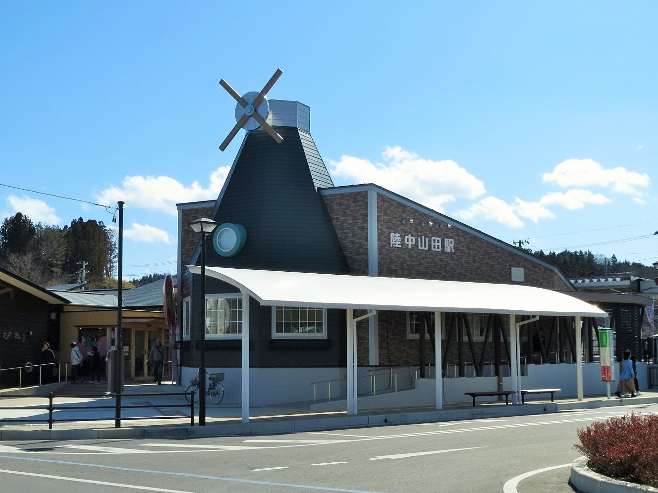 復旧直後の陸中山田駅 Canon IXY 3